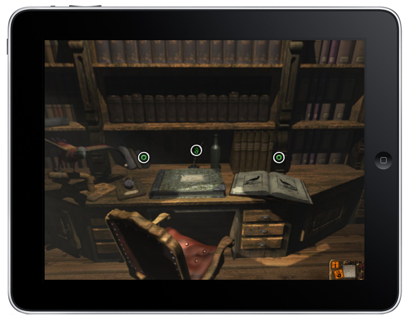 Capture d'écran du jeu vidéo L'Amerzone (version iPad), développé et édité par Anuman Interactive.